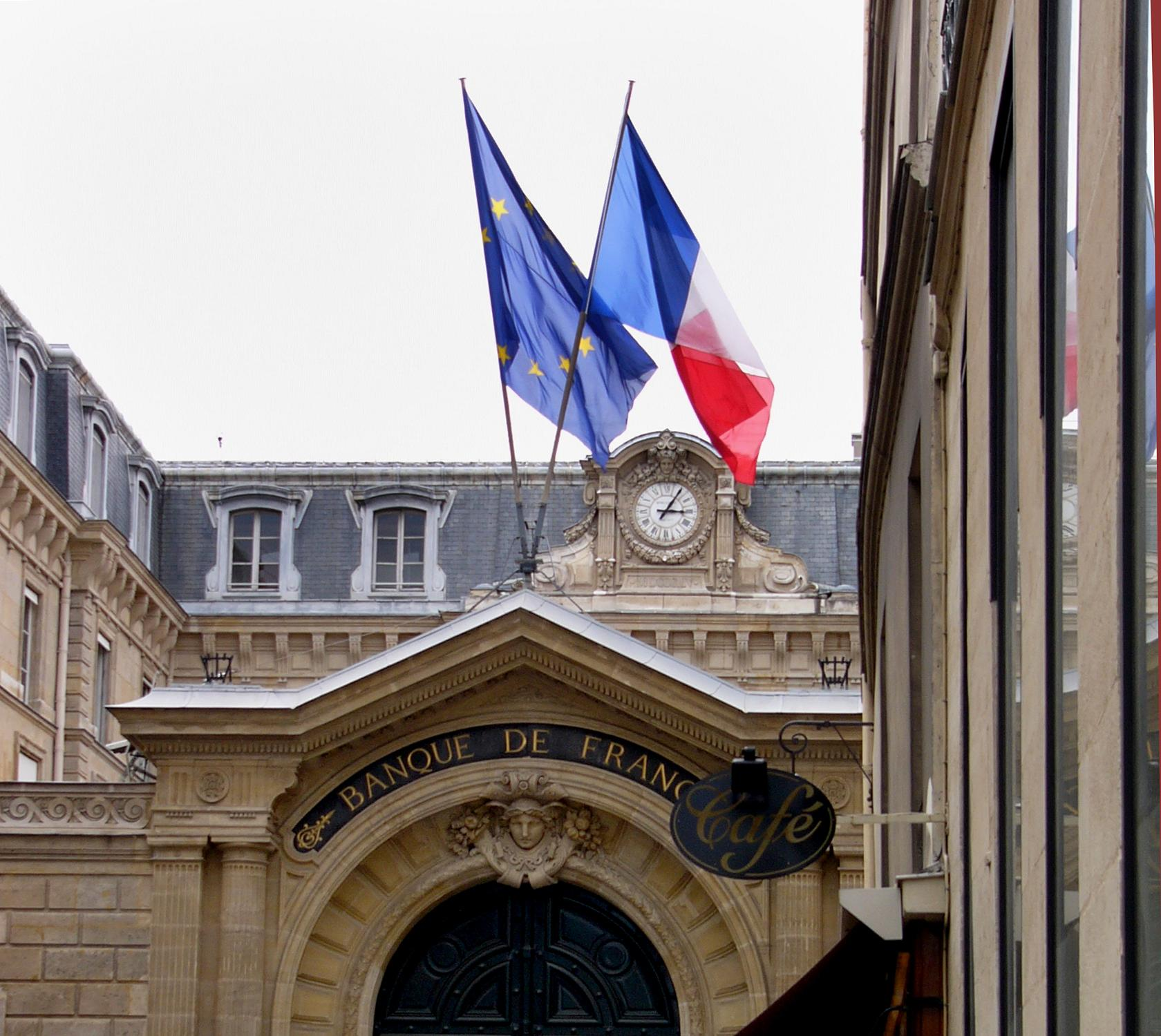 El edificio del ex banco central de Francia en París (hôtel de Toulouse).